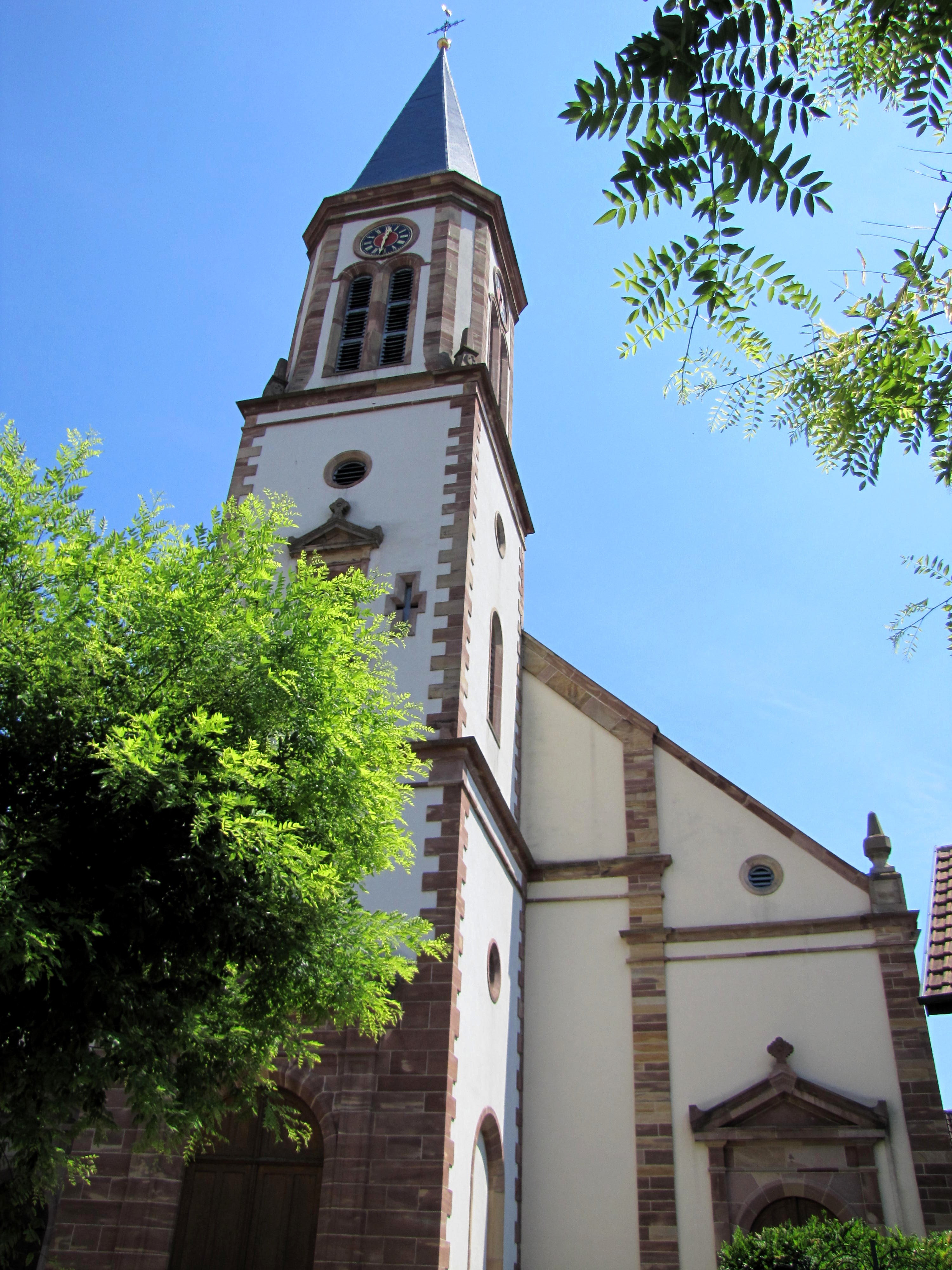 Alsace, Bas-Rhin, Benfeld, Église Saint-Laurent (IA00023501).